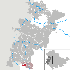 Klings in Thuringia - Wartburgkreis